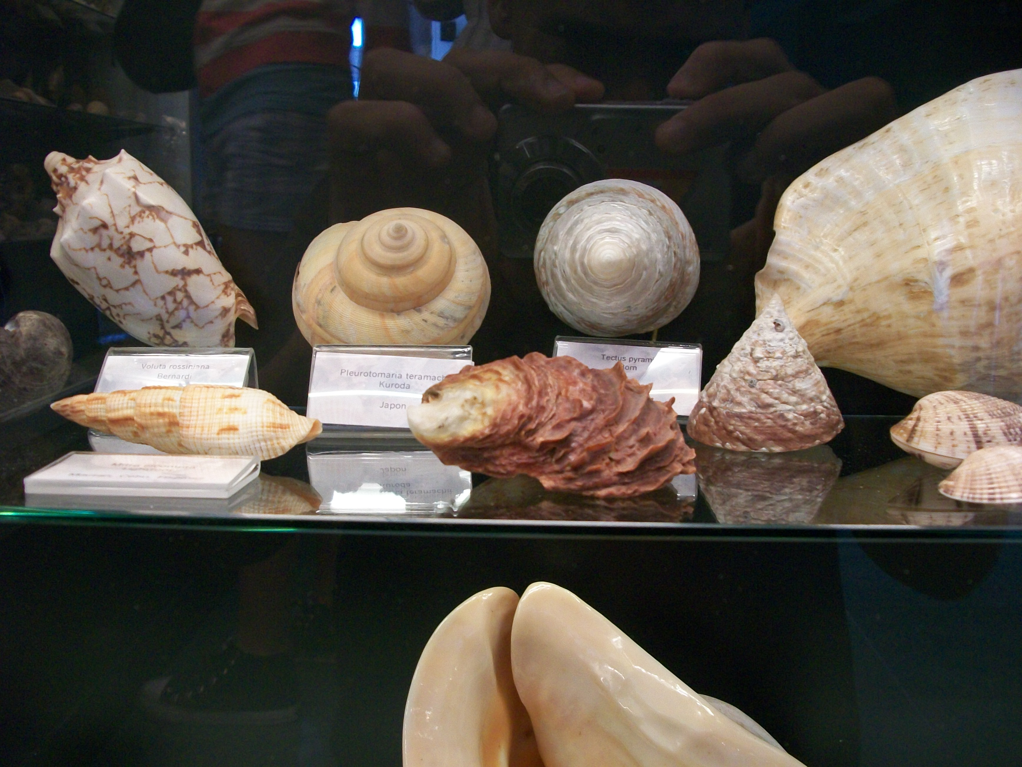 Museo del mar, Mar del Plata, Argentina ; Voluta rossiniana